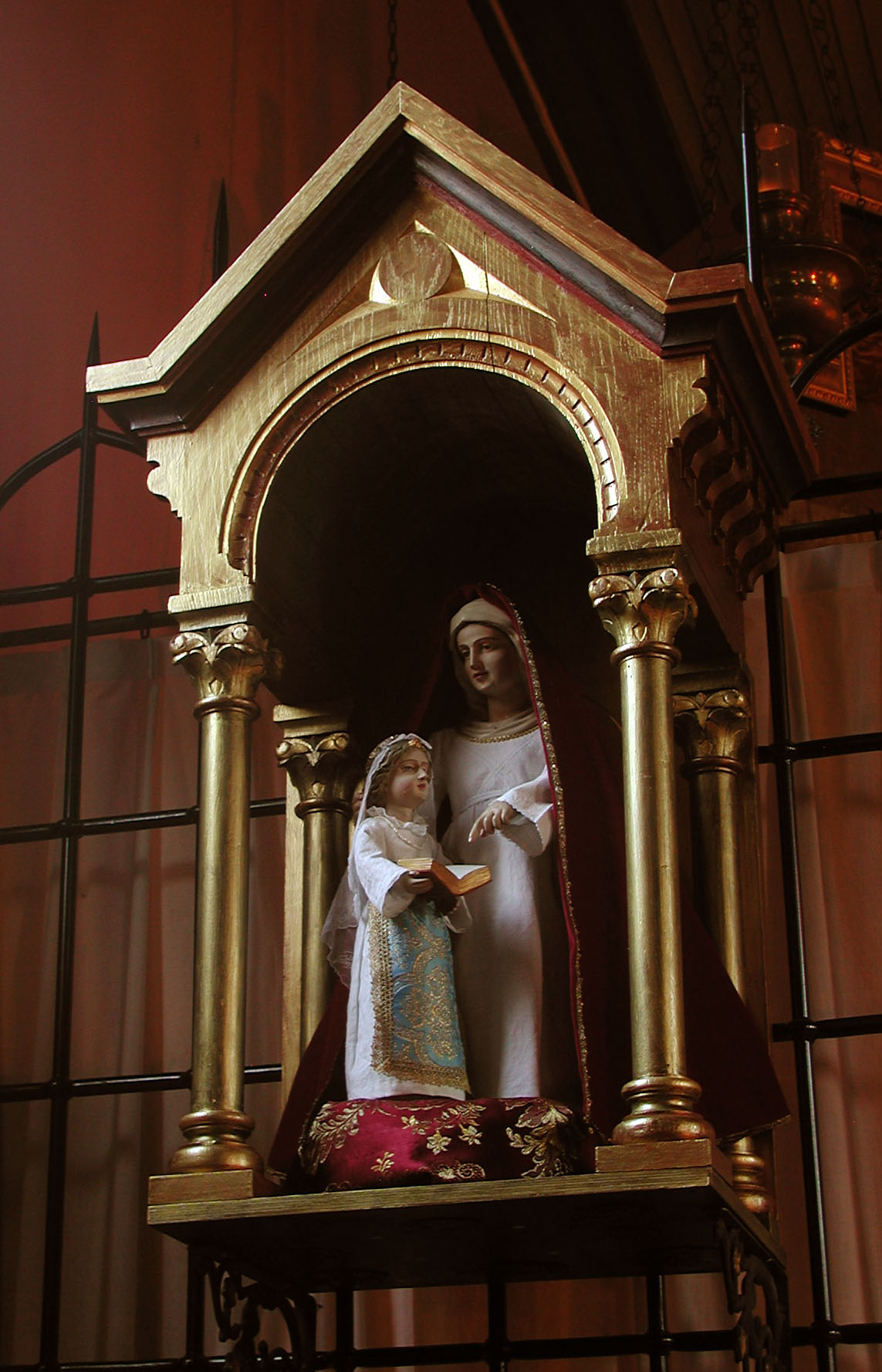 Description Staakbeeld van de heilige Anna in de kluiskerk van Warfhuizen. Date10 December 2006SourceZelf gemaaktAuthorbroeder Hugo Staakbeeld van de heilige Anna in de kluiskerk van Warfhuizen.